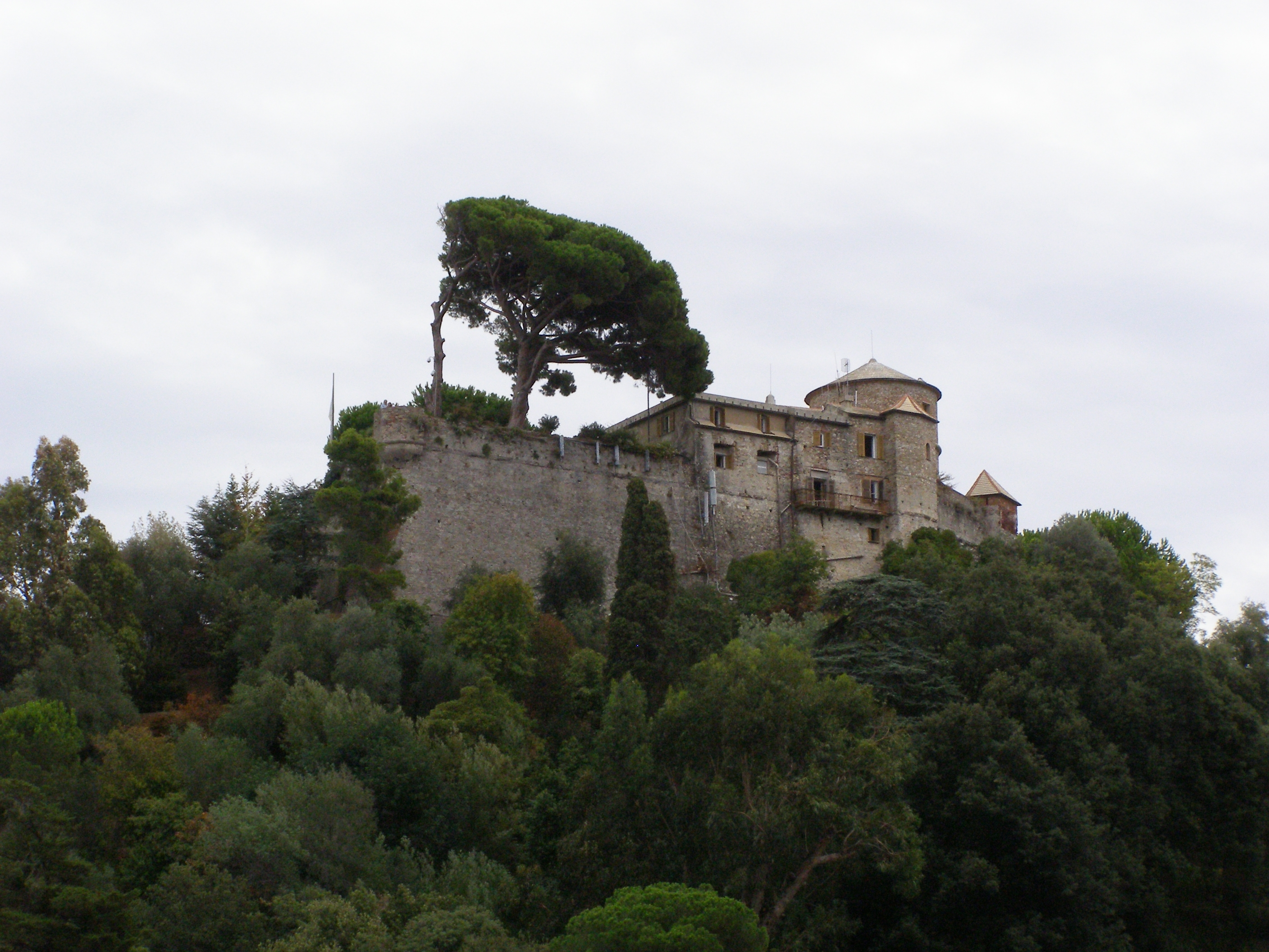 Portofino - Castello Brown